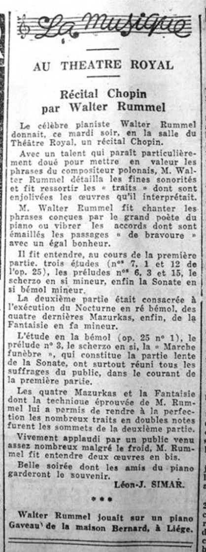 Archivo 2